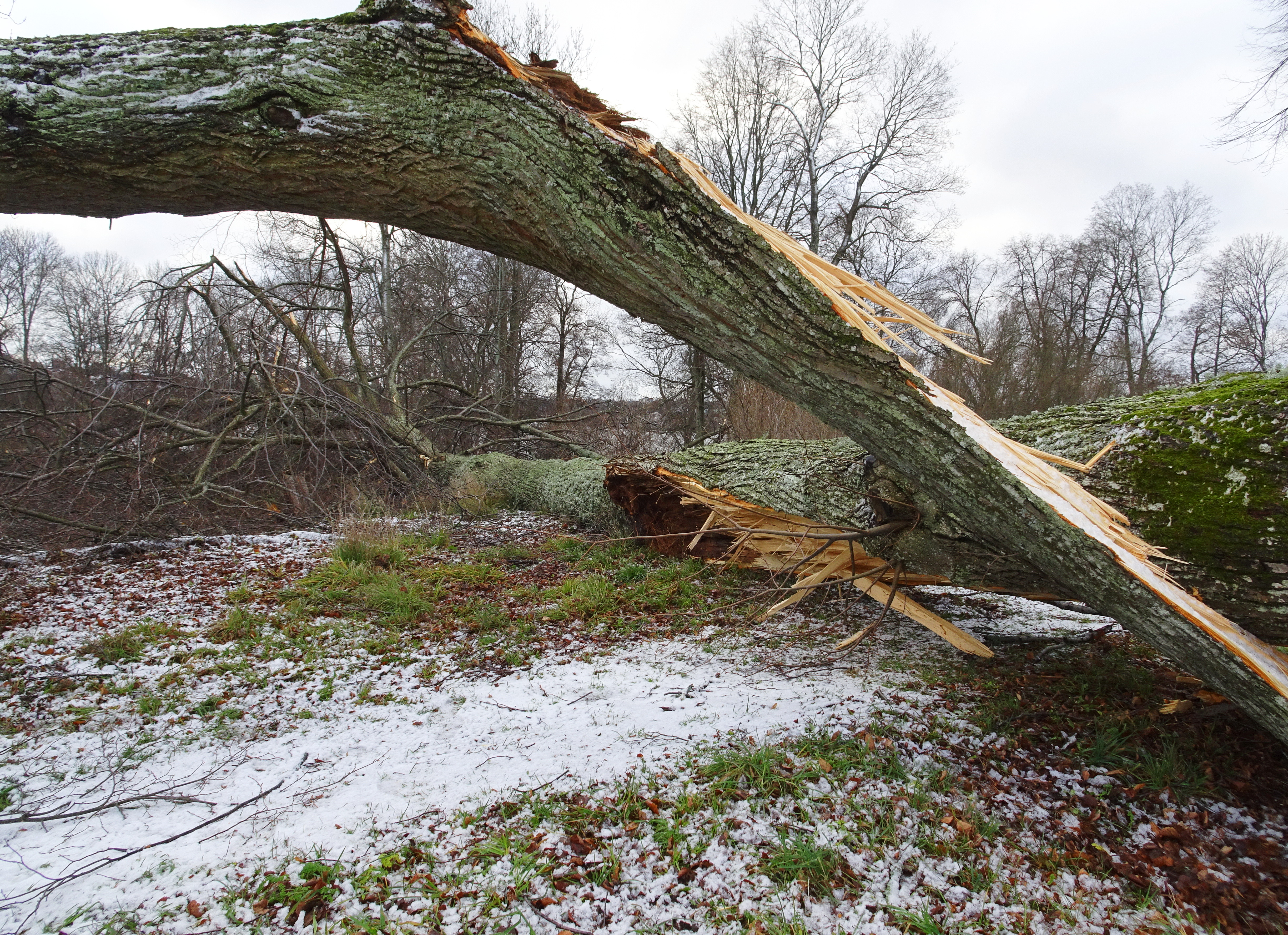 Omkullblåst träd i Vårby gård efter stormen Alfrida